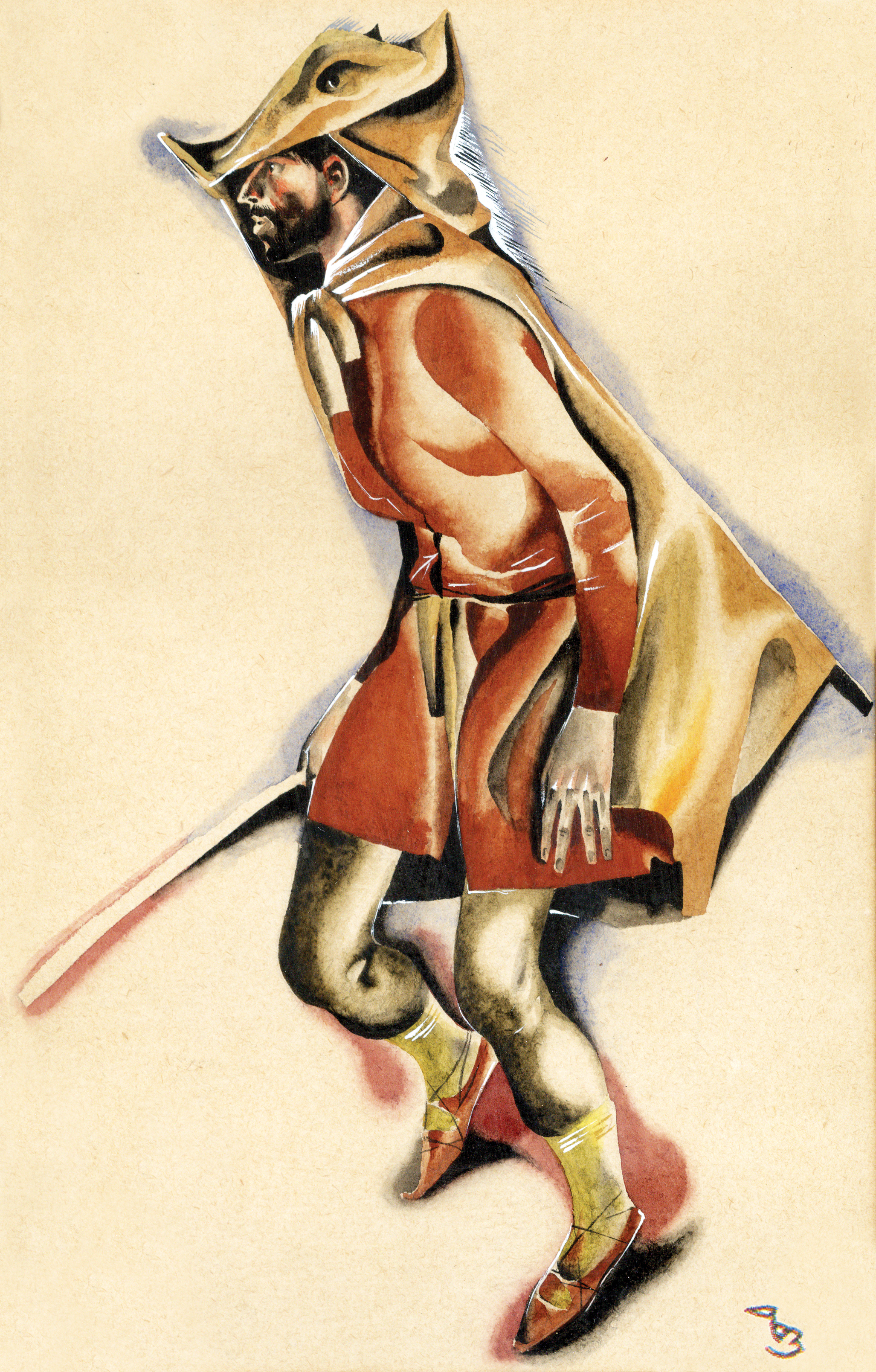 მხატვარი ზურაბ ფორჩხიძე 1966